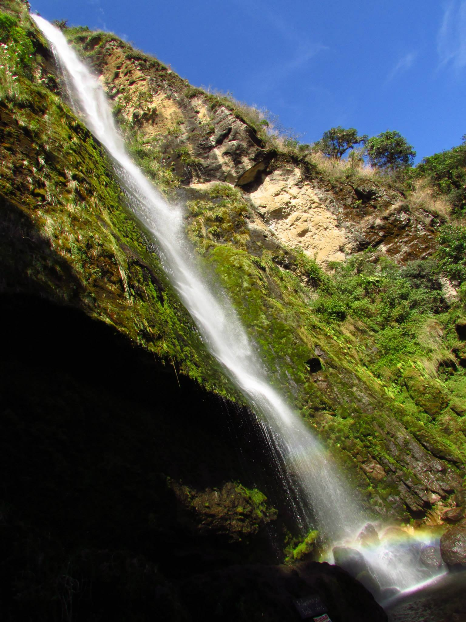 Esta cascada es sólo un ejemplo para mostrar que este cantón brinda de Turismo para sus residentes y visitadores.